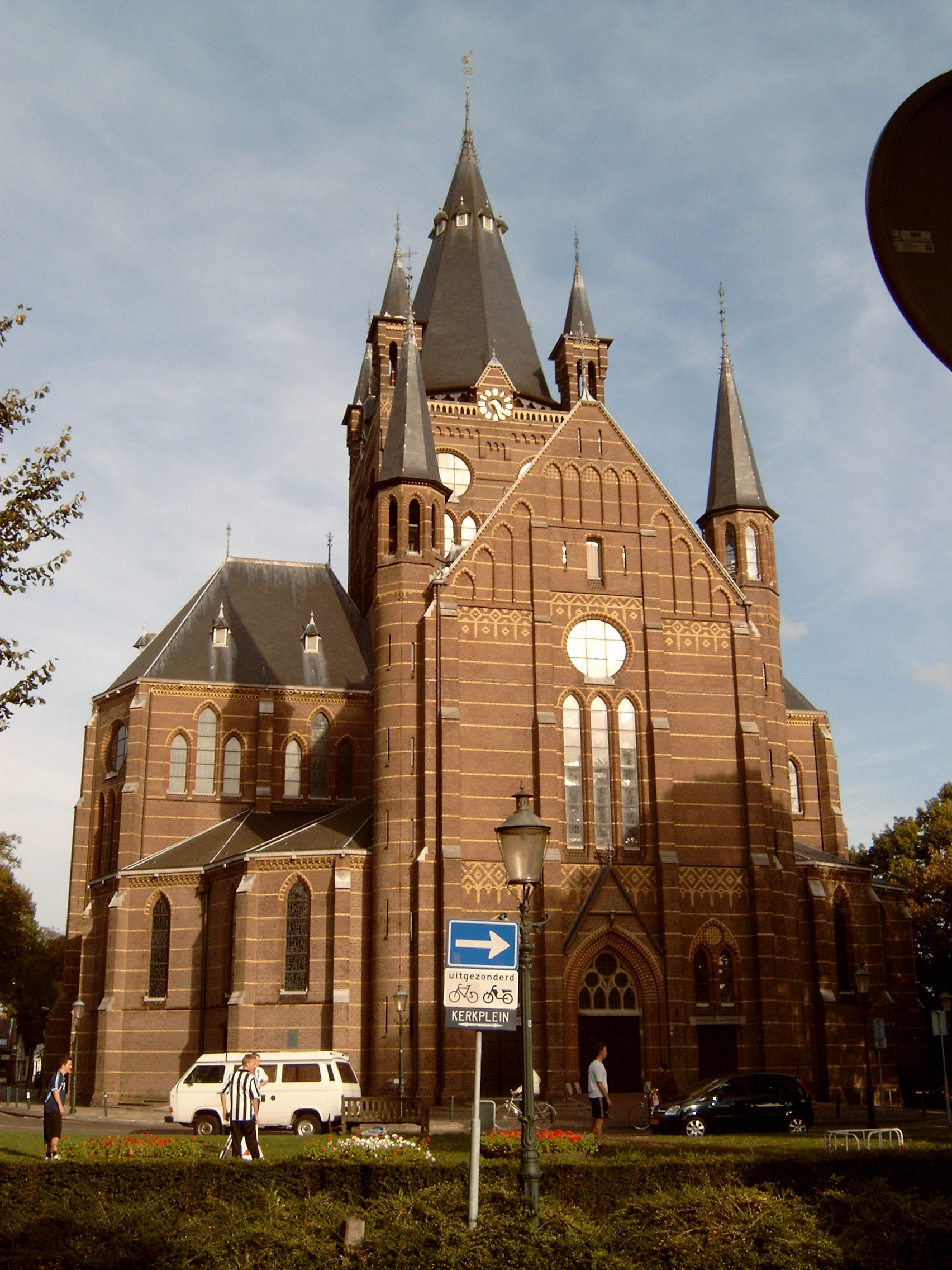 Oisterwijk, kerk